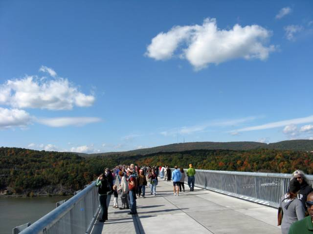 Fussweg auf der Poughkeepsie Bridge